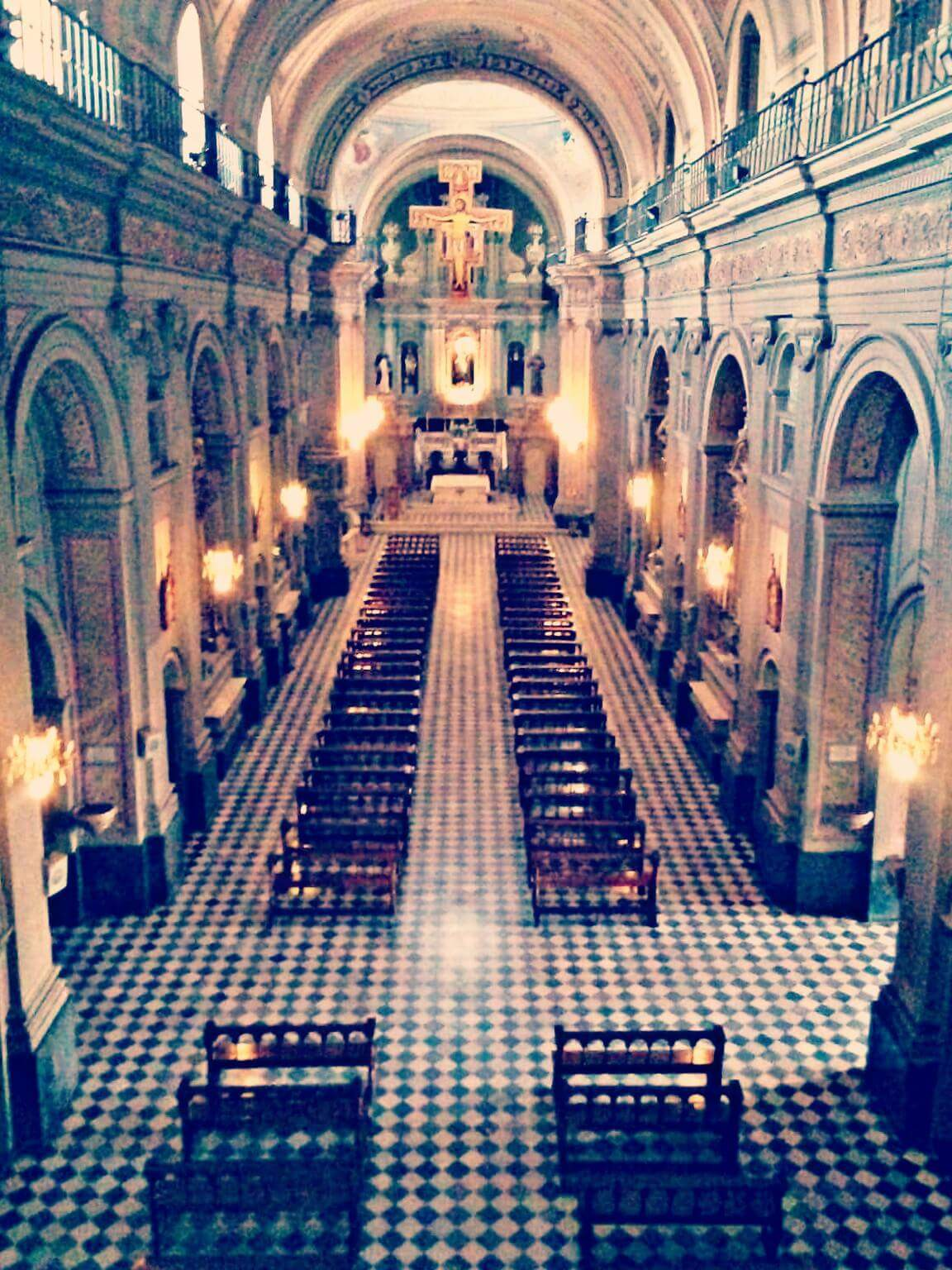 Iglesia San Francisco